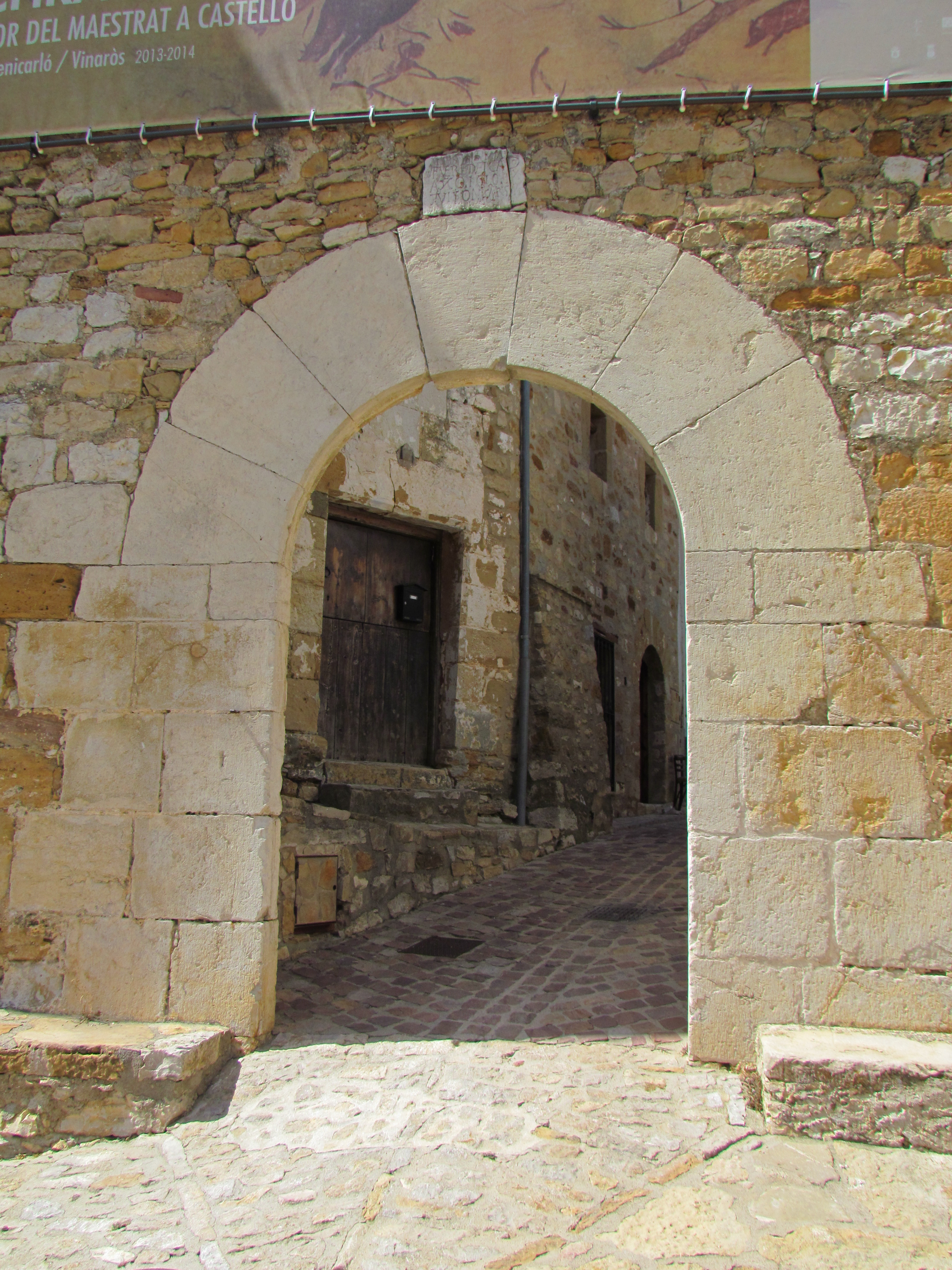 Porta Nova de Culla, Alt Maestrat (País Valencià)